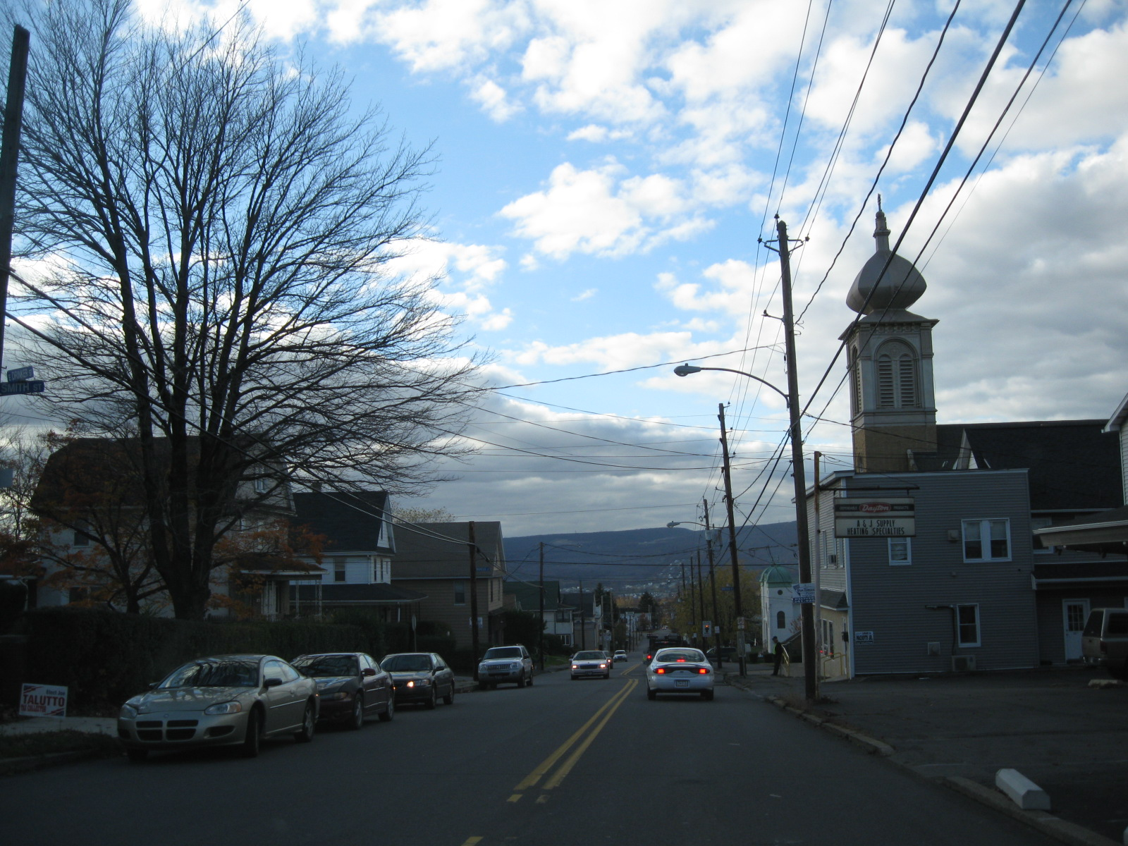 Dunmore, Pennsylvania